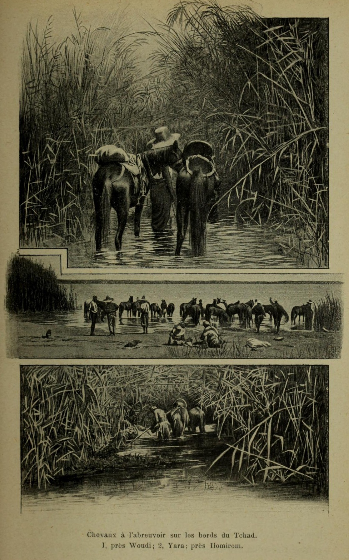 Caballos abrevando en las orillas del lago Chad, en 1900. Orilla noroeste del lago en zona actualmente desecada. Níger. Ilustración de la página 643 del libro "Mission saharienne Foureau-Lamy. D'Alger au Congo par le Tchad" París, 1901